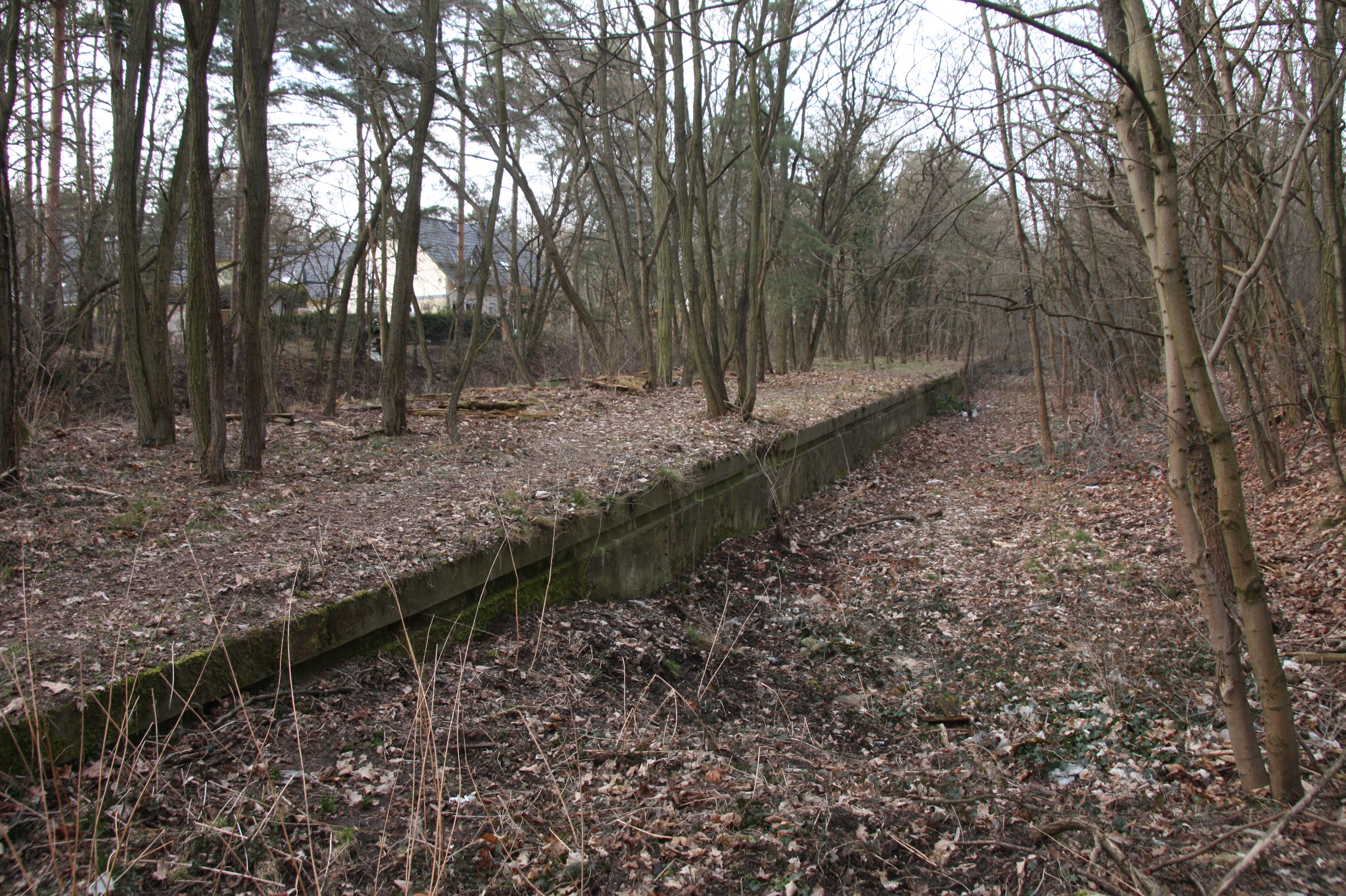 ehemaliger Bahnhof Stahnsdorf, überwachsener Bahnsteig im Frühjahr 2016